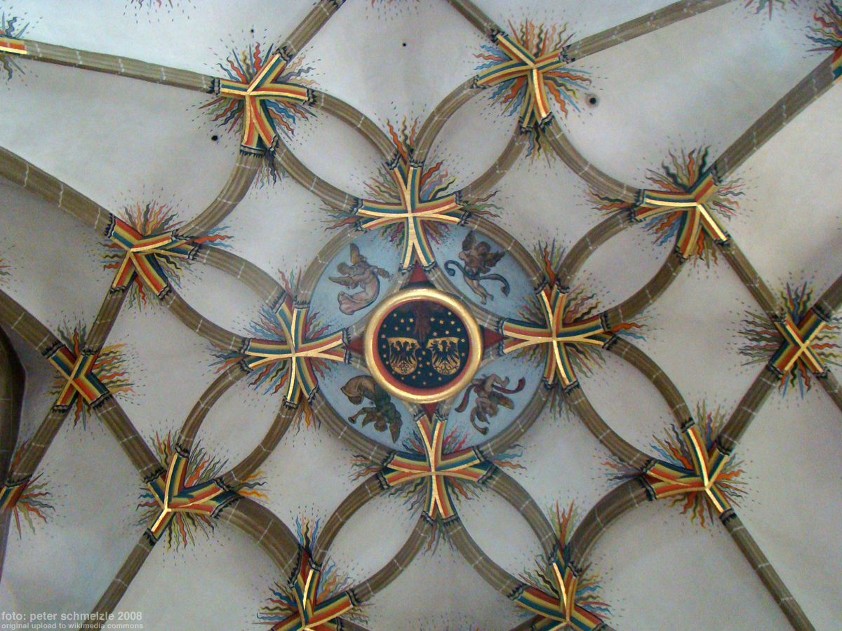 Netzgewölbe der Stadtkirche Bad Wimpfen